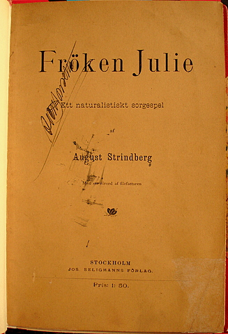 Portada original del libro Fröken Julie.